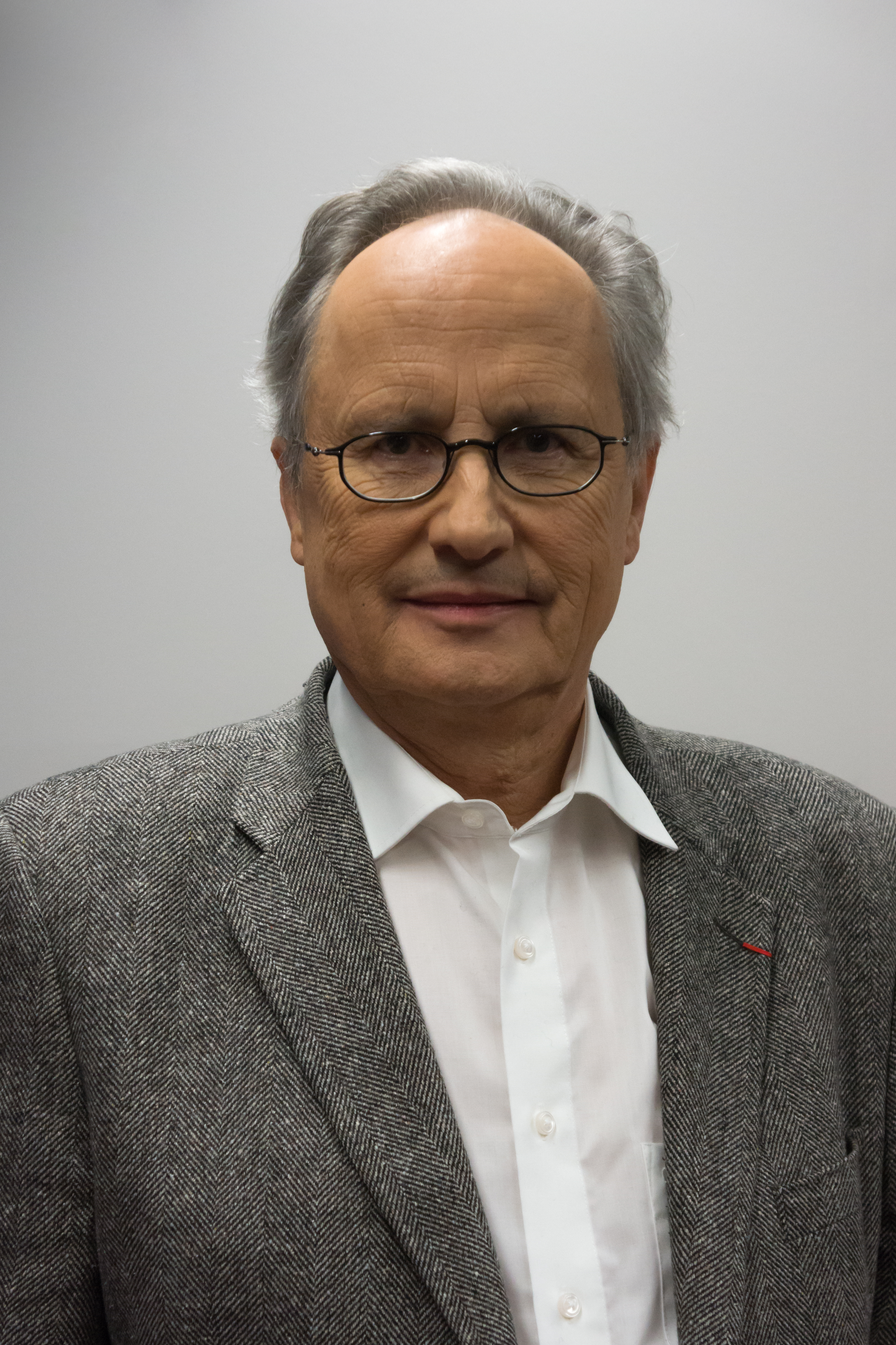 Jacques Pilet, journaliste suisse.